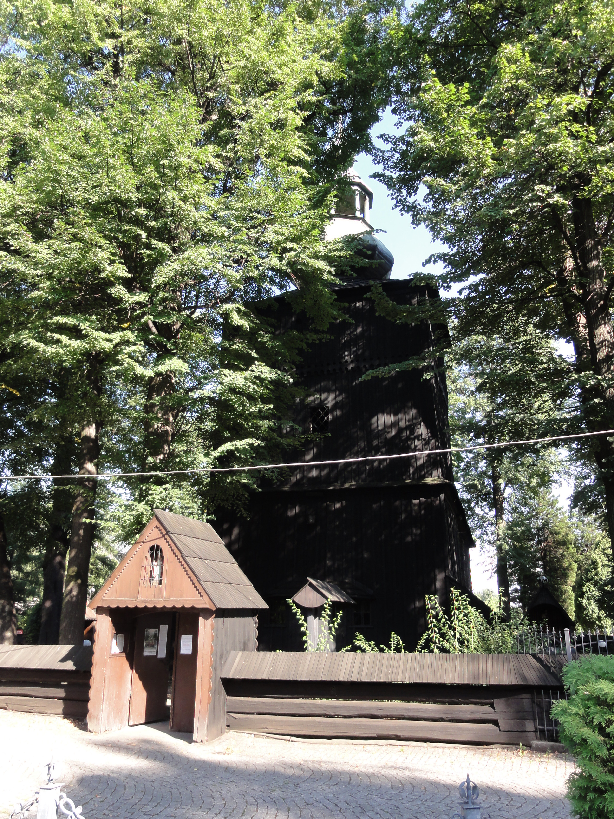 Bielsko-Biała Mikuszowice (Krakowskie) - kościół św. Barbary